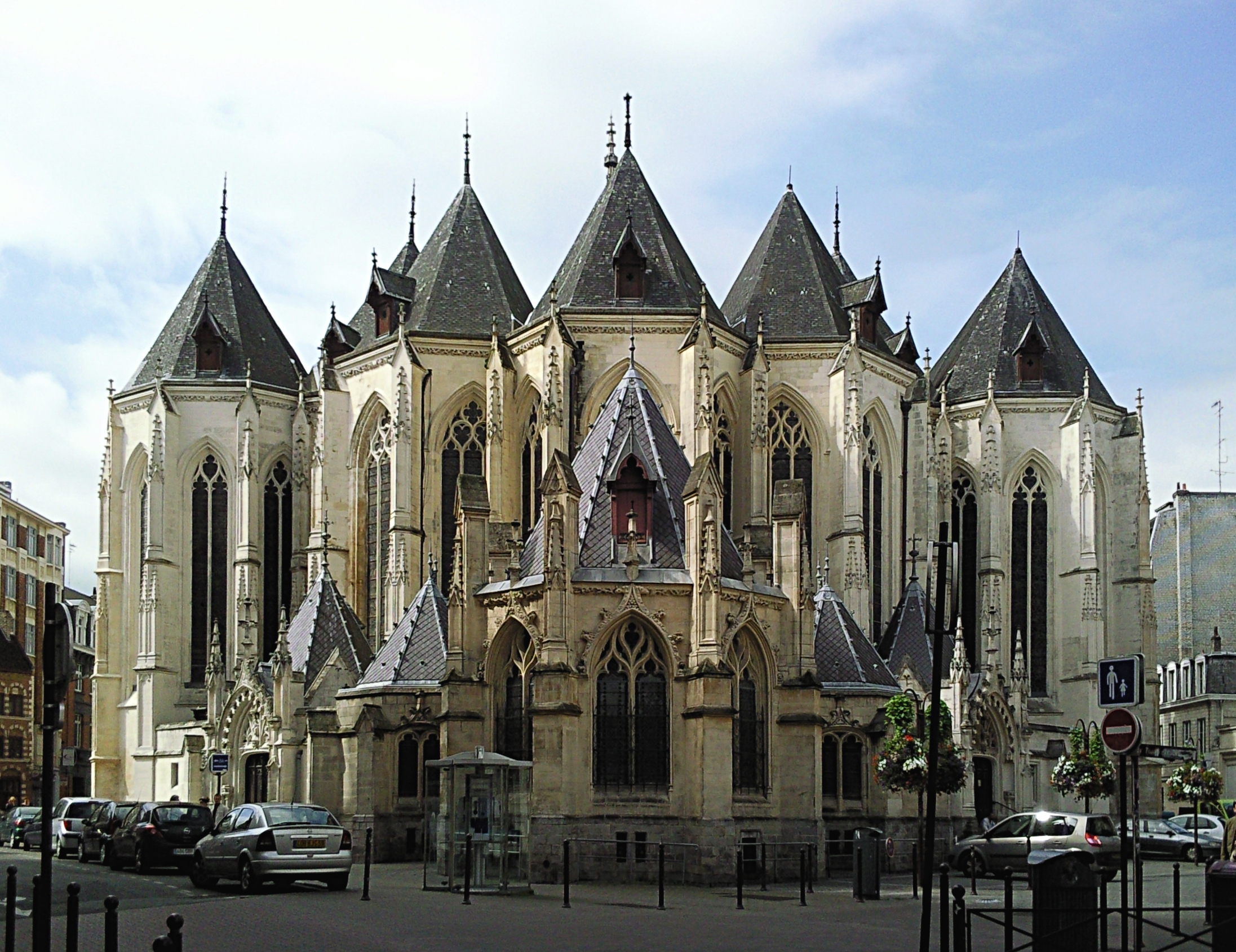 Lille (Nord). Église Saint-Maurice. Vue de l'abside.